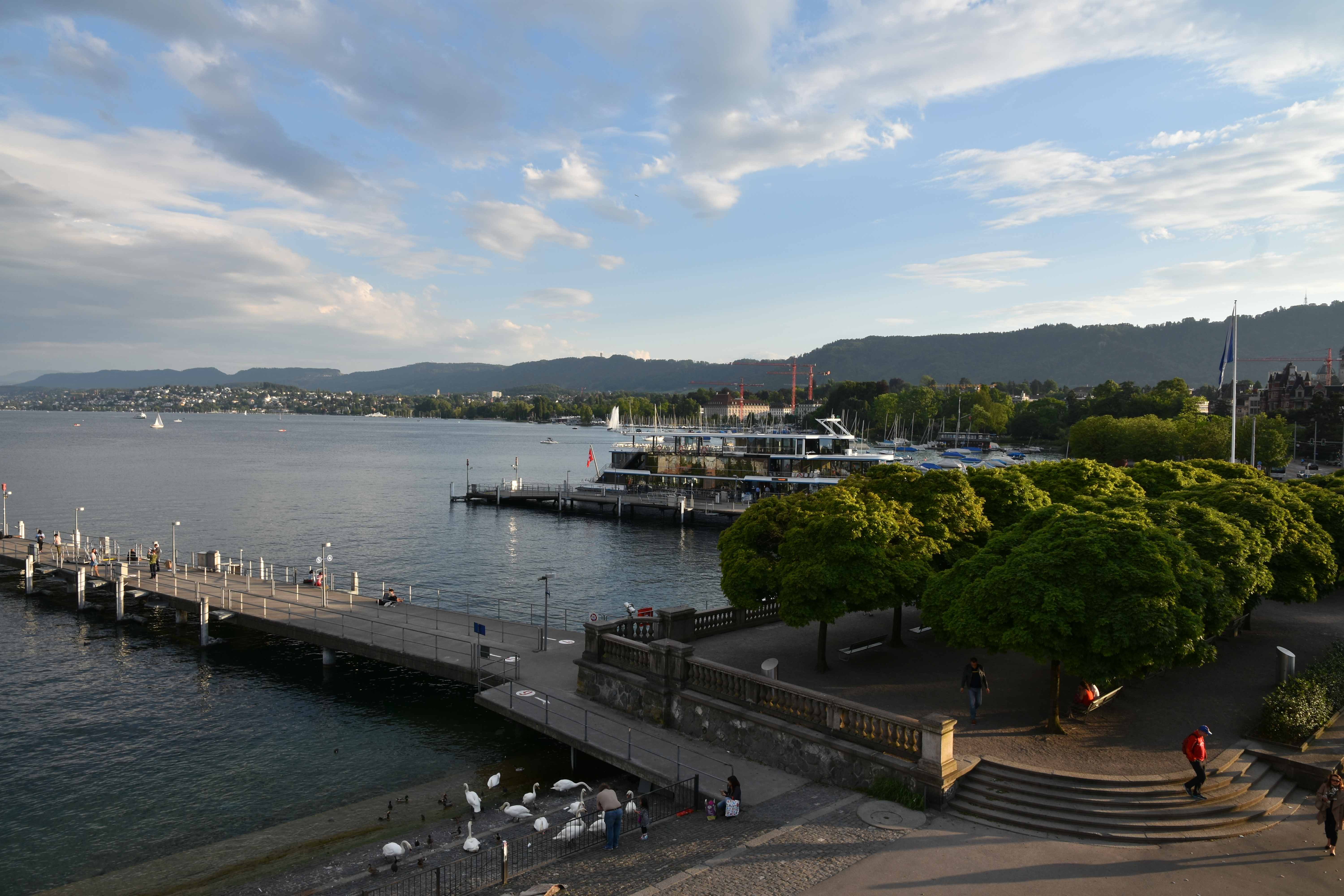 Zürichsee at Zürich: ZSG Pantha Rhei at Bürkliplatz, Felsenegg and Zimmerberg in the background.